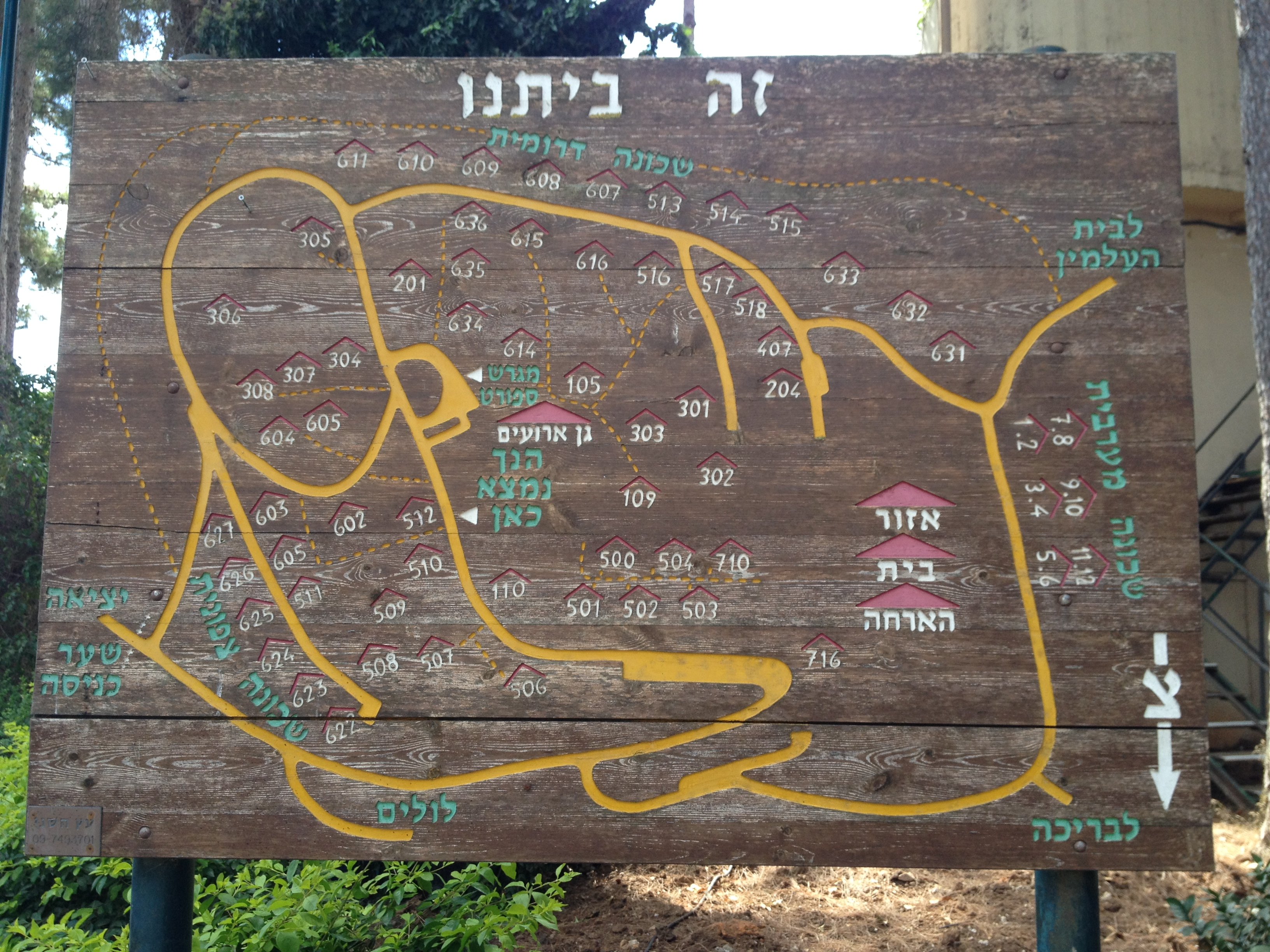 Карта киббуца Бейт-Орен, вырезанная на деревянном щите